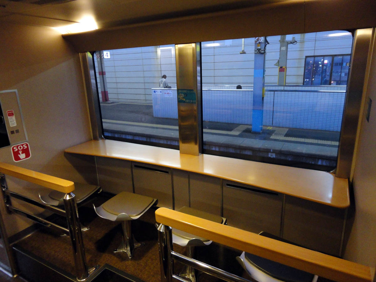 JR西日本285系 ラウンジ